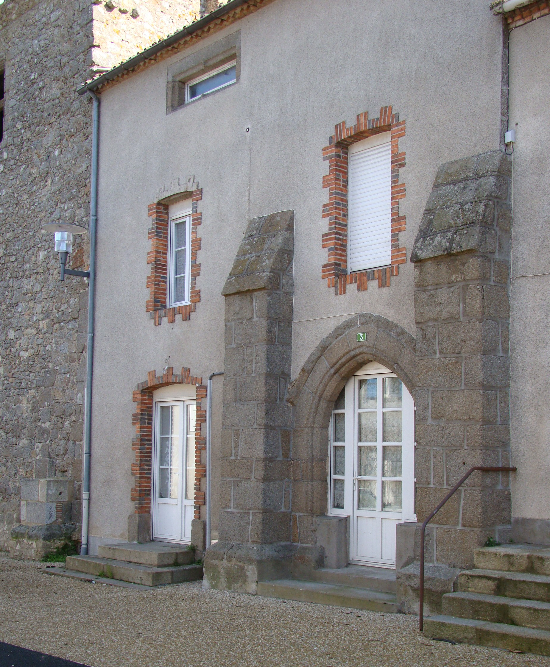 L'ancienne chapelle Saint-Nicolas à Noirterre - Propriété privée (Deux-Sèvres - France)